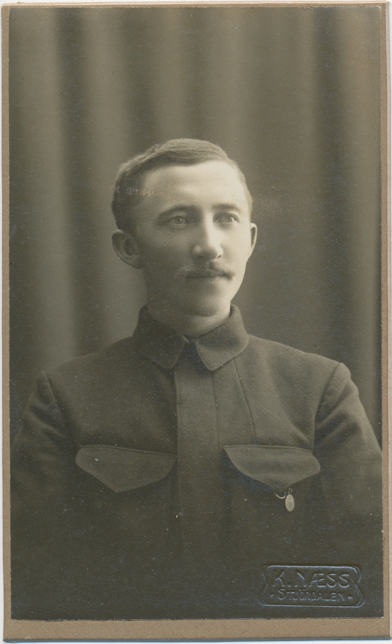 Sæmund Fiskvik (1891-1980), Skatval. Se Skatval gårds- og slektshistorie bind 1, s. 145. Fotograf / Photographer: K. Næss, Stjørdalen Fotoeier / Photo owner: Bergljot Husby Digitalisering / Digitizing: Arne Langås (2009) Foto-ID / Photo ID: 046-0021 Hvis bildet gjengis i andre sammenhenger, oppgi Åsen Museum og Historielag, fotoeier og fotograf som kildereferanse. Har du utfyllende opplysninger? Legg gjerne igjen en kommentar nedenfor eller send e-post til . | If you re-use this photo, please refer to Åsen Museum og Historielag, the photographer and the owner of the photo. Do you have additional information? Please leave a comment or send an e-mail to .